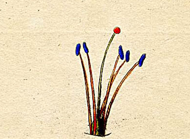 Ausschnitt (Klasse V) aus Ehrets Tafel "Methodus Plantarum Sexualis"